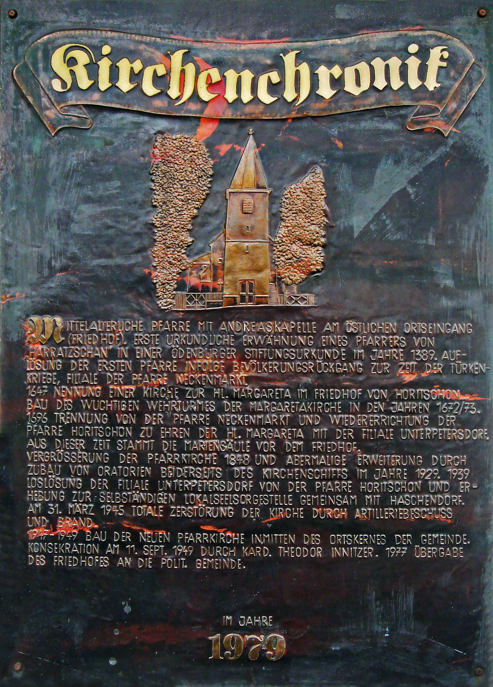 Horitschon, Burgenland, Kirchenchronik (1979), Kupferplatte an der westlichen Außenmauer der Aufbahrungshalle des Friedhofs